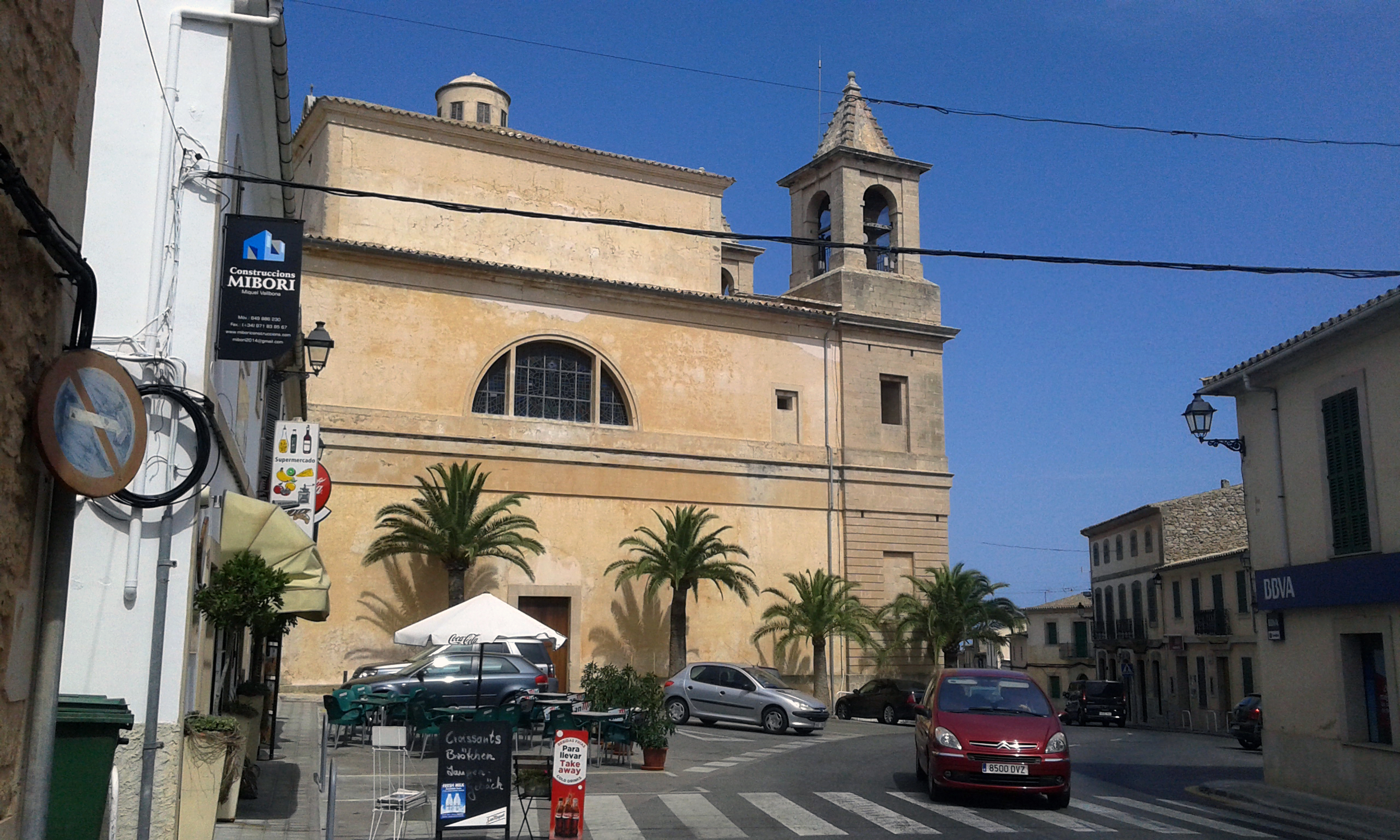 Parroquia De San José, Esglesia de S'Alqueria Blanca, 07691 S'Alqueria Blanca, Illes Balears, Spain